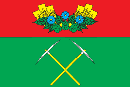 Прапор Черняхівського району